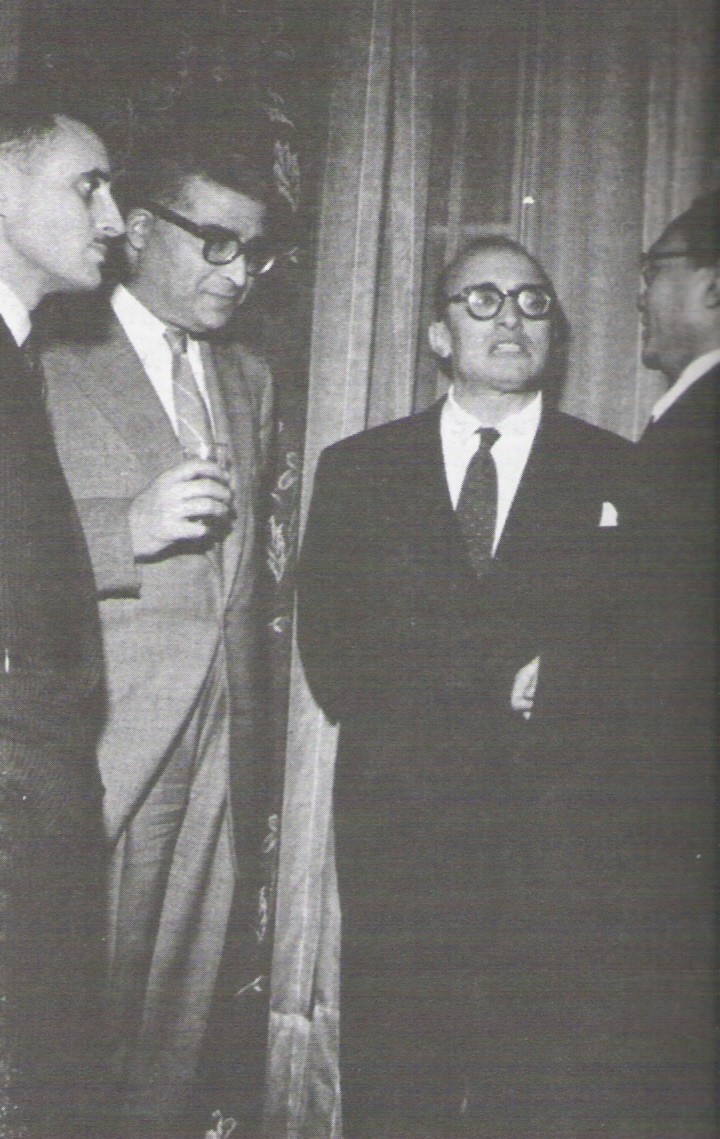 Habib Bourguiba Jr., Bahi Ladgham et Salah Ben Youssef en entretien avec le représentant de la Birmanie à l'ONU, U Thant